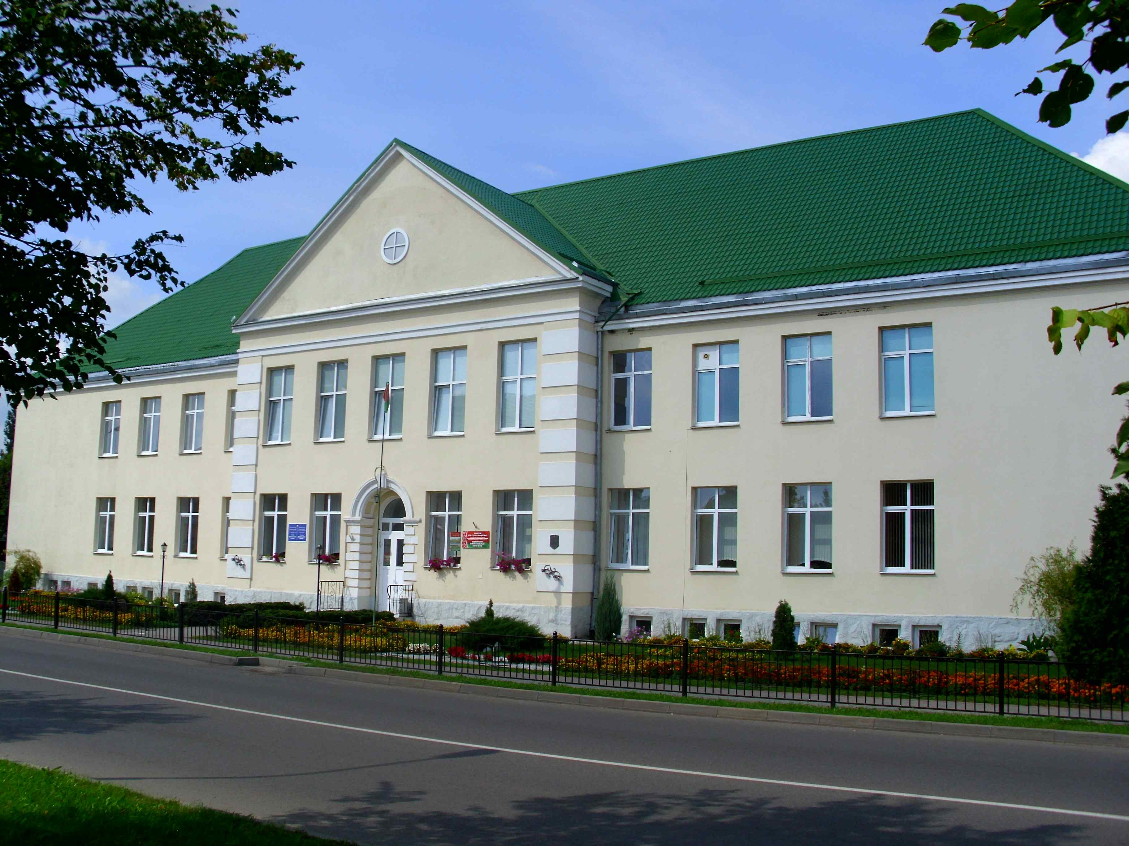 Ул. Советская, 94. Школа № 1. Кобрин, Брестская область, Беларусь. This is a photo of Belarusian heritage monument. Reference number: 113Г000398 ( WLM)